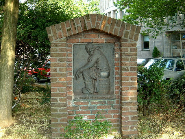 Tönnekesdrieter-Denkmal in Duisburg-Ruhrort, Deutschland - Kasteelstraße, Eingang der eh. Altstadt (abgerissen)